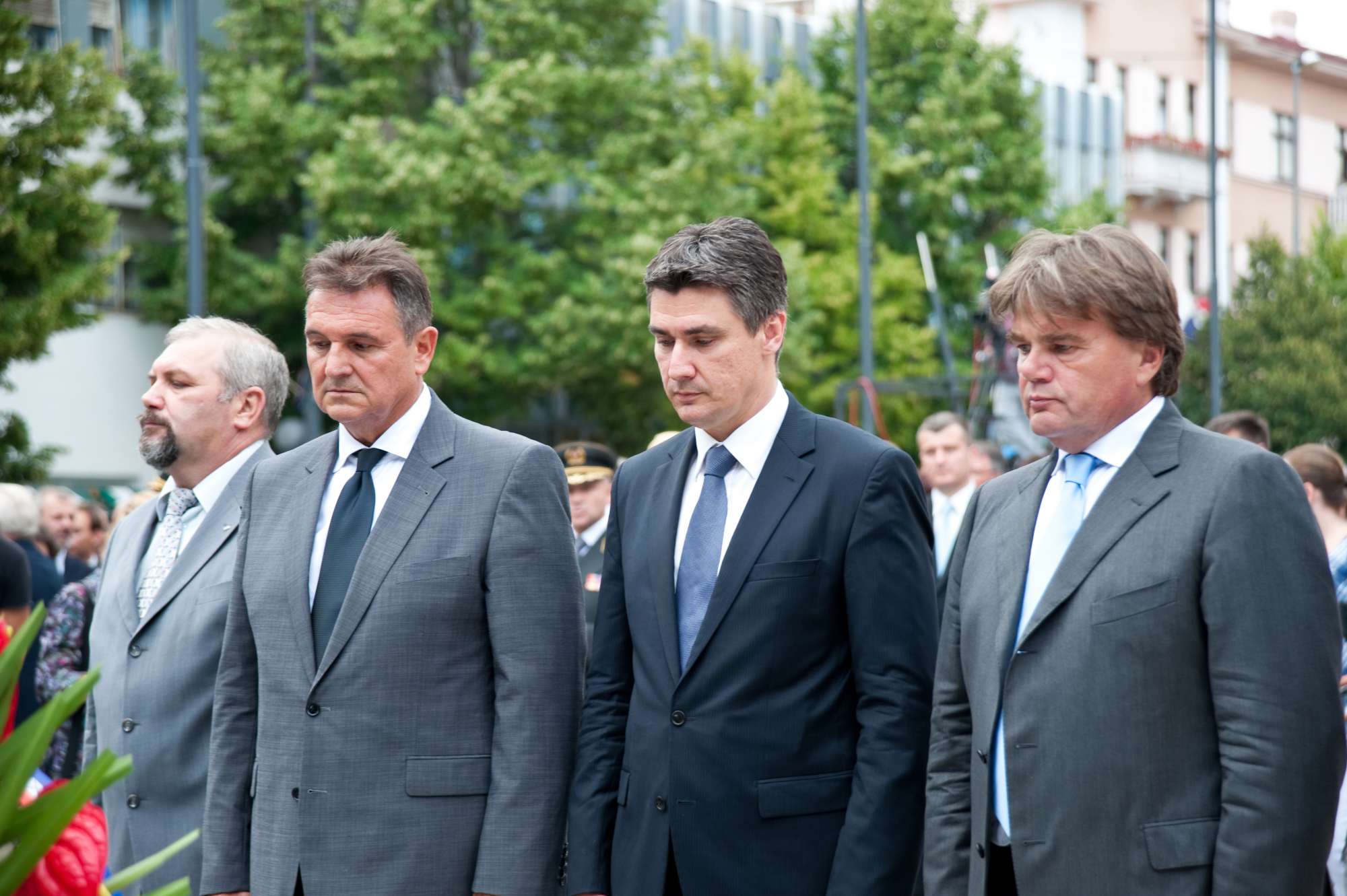 16. obljetnica vojnoredarstvene operacije Oluja